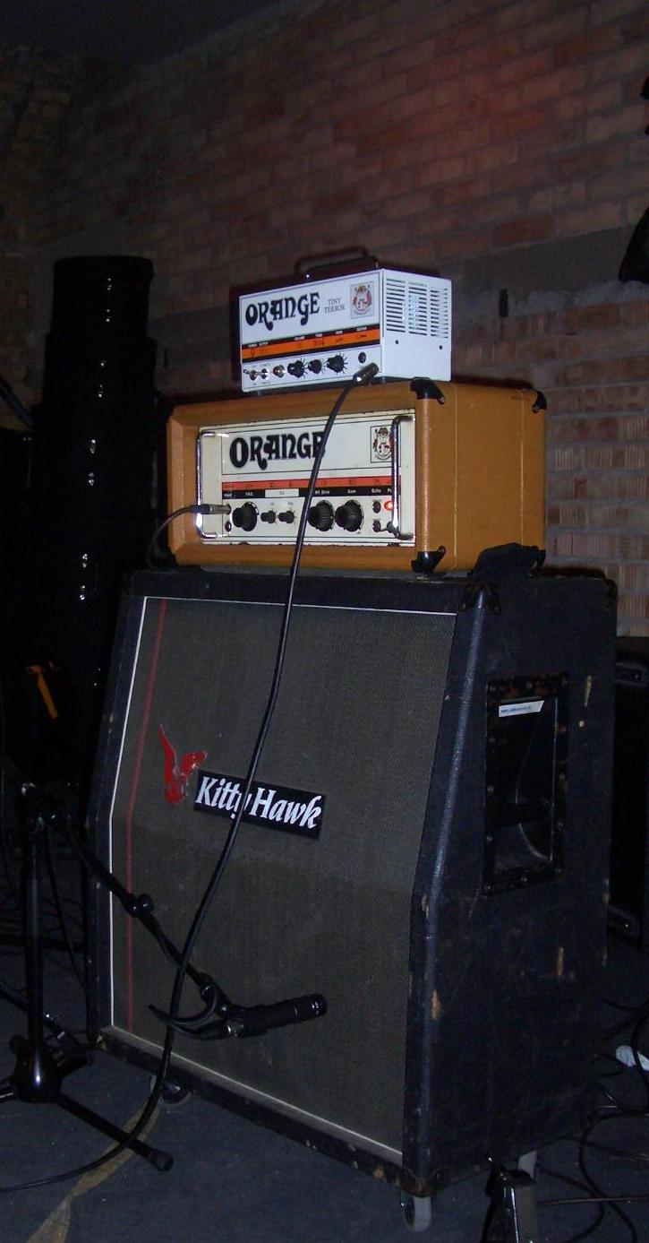 Lukács Péter erősítője a KLB Trióval 2009-ben